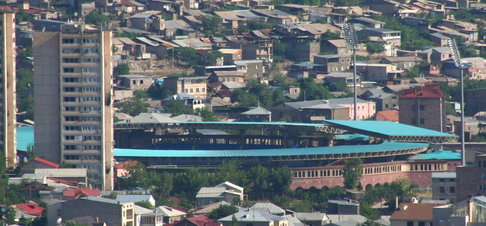 Stade de la Républiquen à Erevan